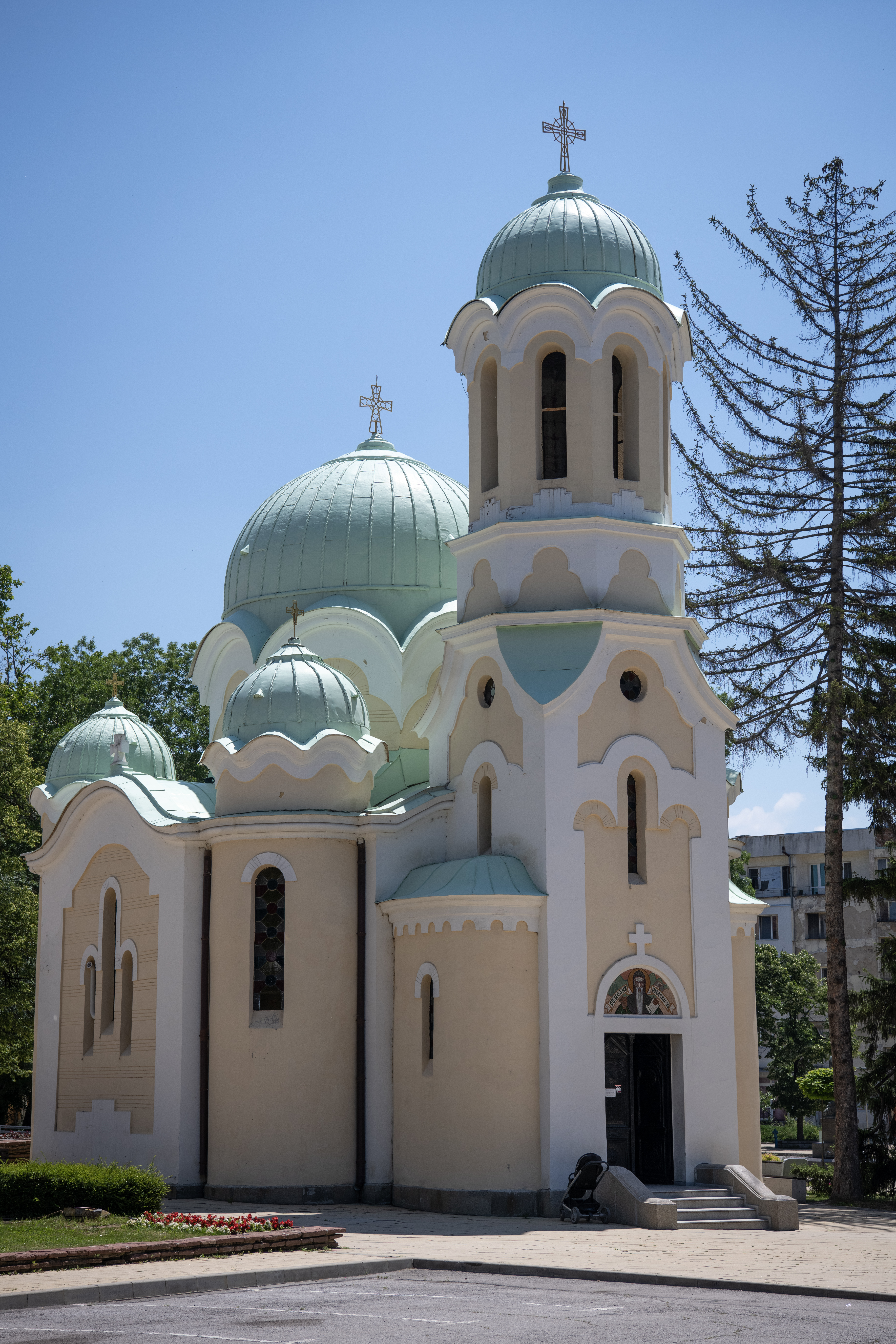 Снимката документира църквата "Свети Иван Рилски“